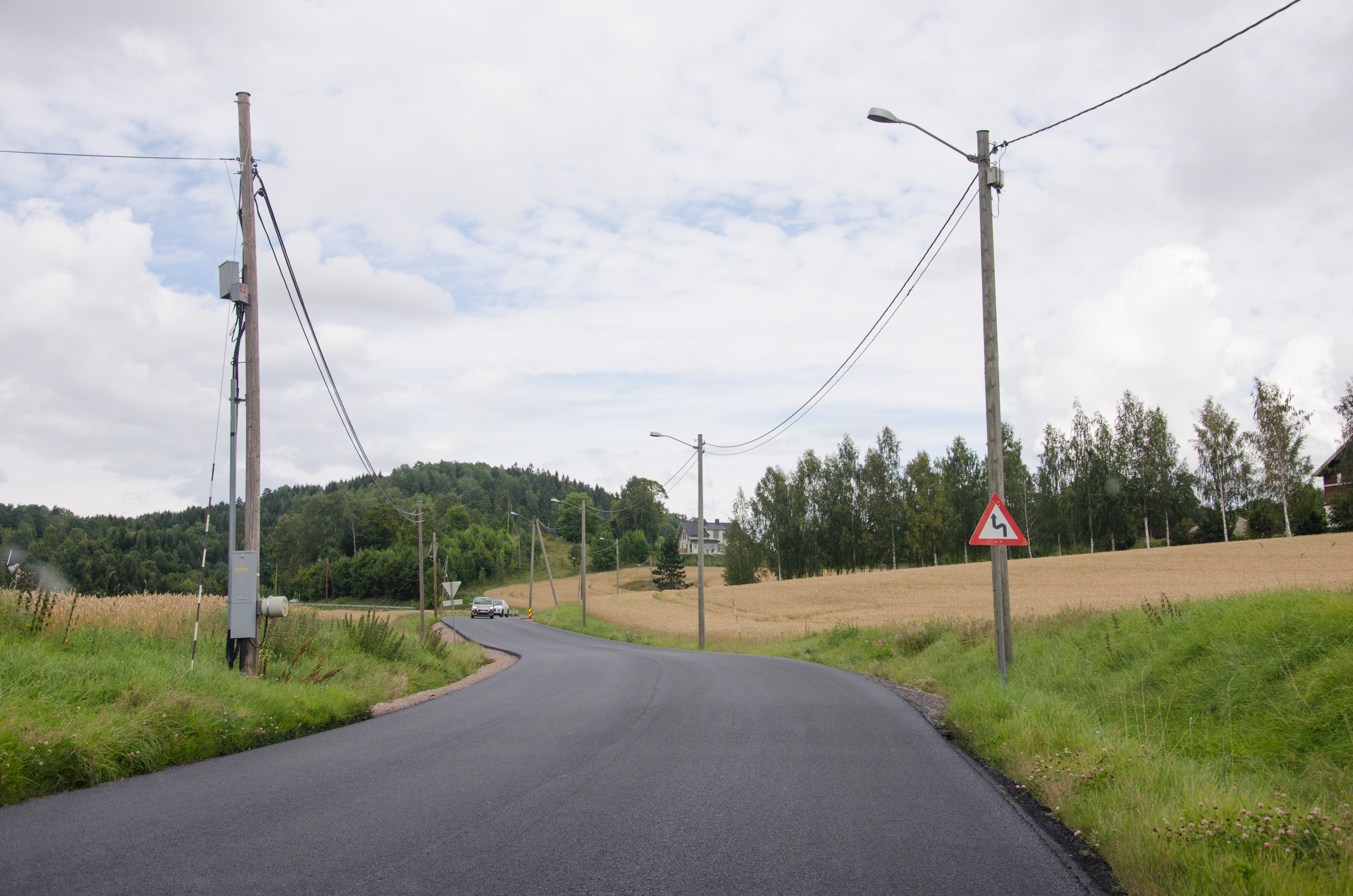 Fylkesvei 6 Sundbyveien